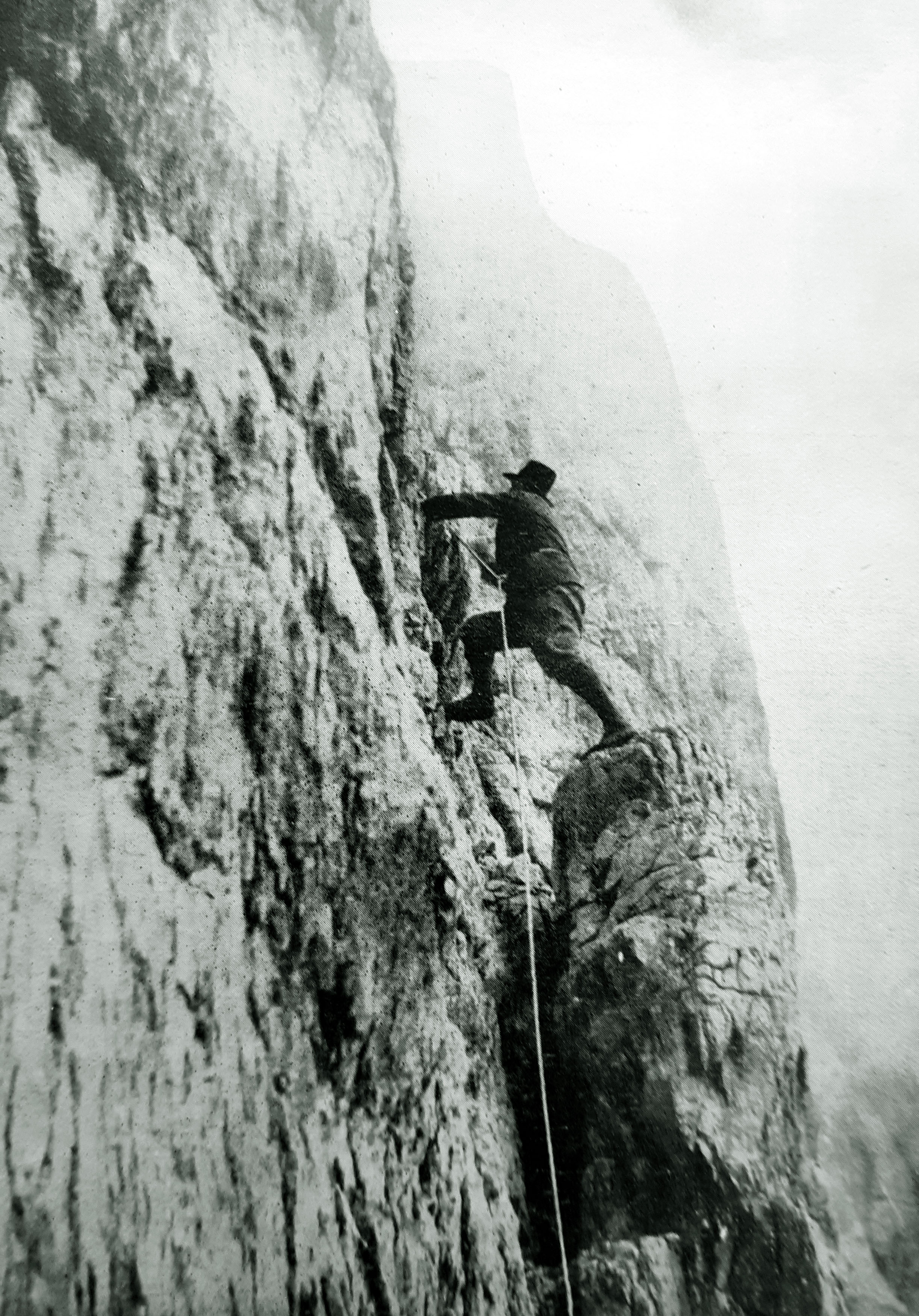 1931 - re Alberto del Belgio scala la parete est della Cima Brenta in Dolomiti